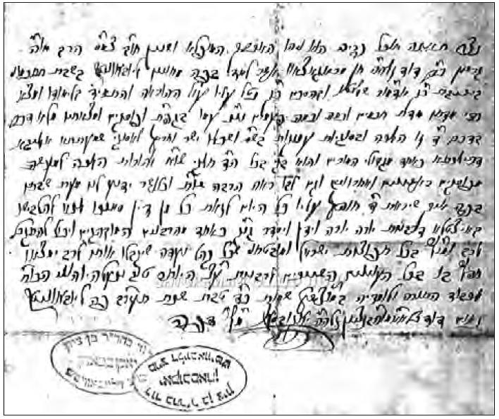 מכתב של הרב דוד יעקובסון עם החותמת האישית